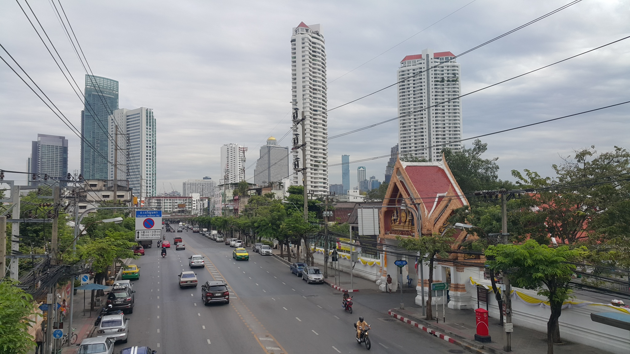 วัดเศวตฉัตรวรวิหาร พระอารามหลวงชั้นตรี ใน เขตคลองสาน กรุงเทพมหานคร